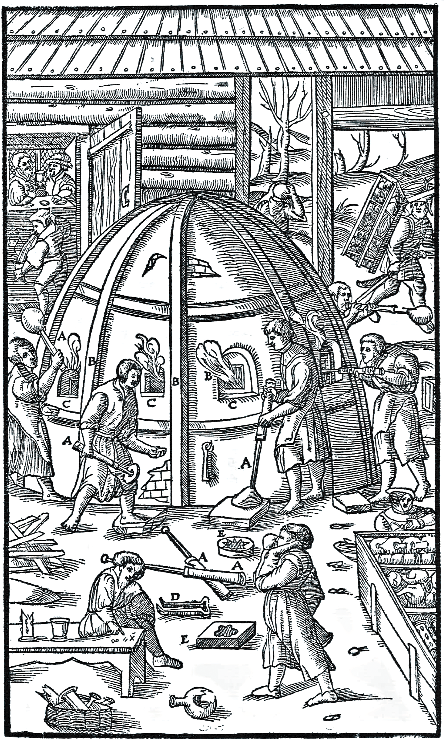 Georg Agricola, Zwölf Bücher vom Berg- und Hüttenwesen, übers. v. Carl Schiffner, Berlin 1928, S. 502 ff. Scanned by Bibliothek für Sozial- und Wirtschaftsgeschichte / Köln, rights released to the public domain. caption:"Die Pfeiffen A. Die kleinen Fenster B. Die Marmorplatten C. Die Zange D. Formen für die Gestaltung der Glaswaren E."